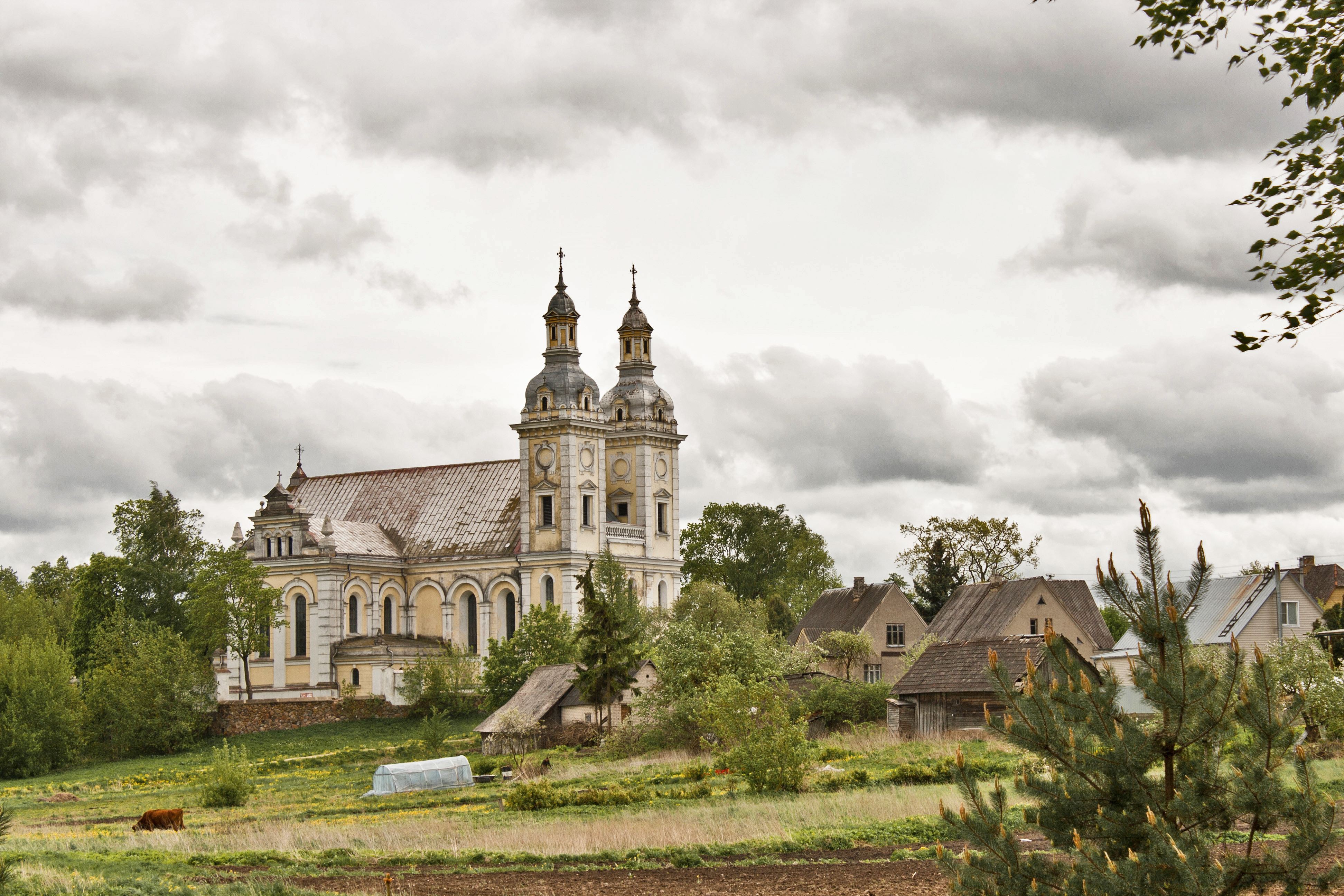 Šeduva church